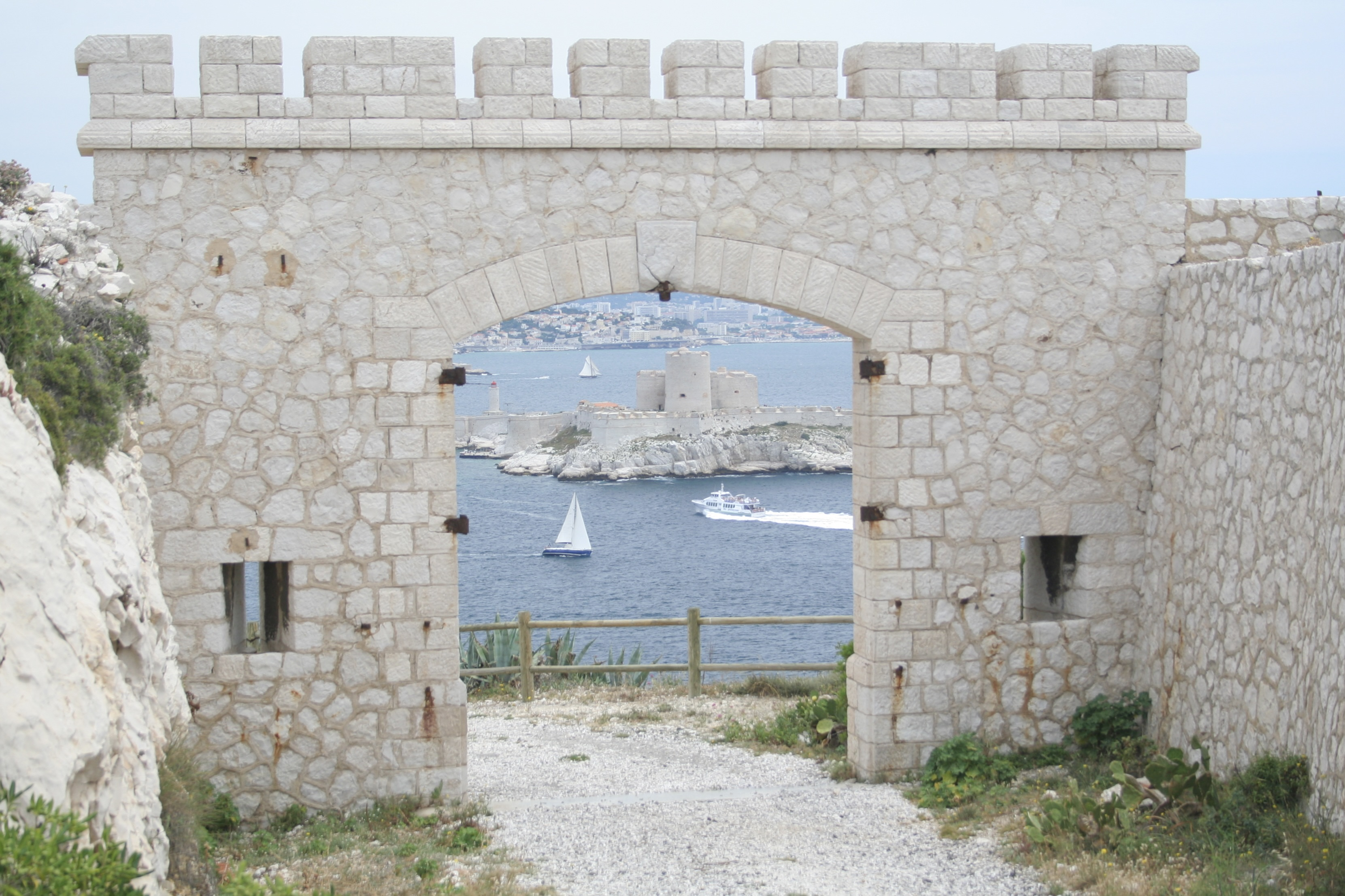 Entrée du Fort de Ratonneau sur l'archipel du Frioul près de MArseille (France)